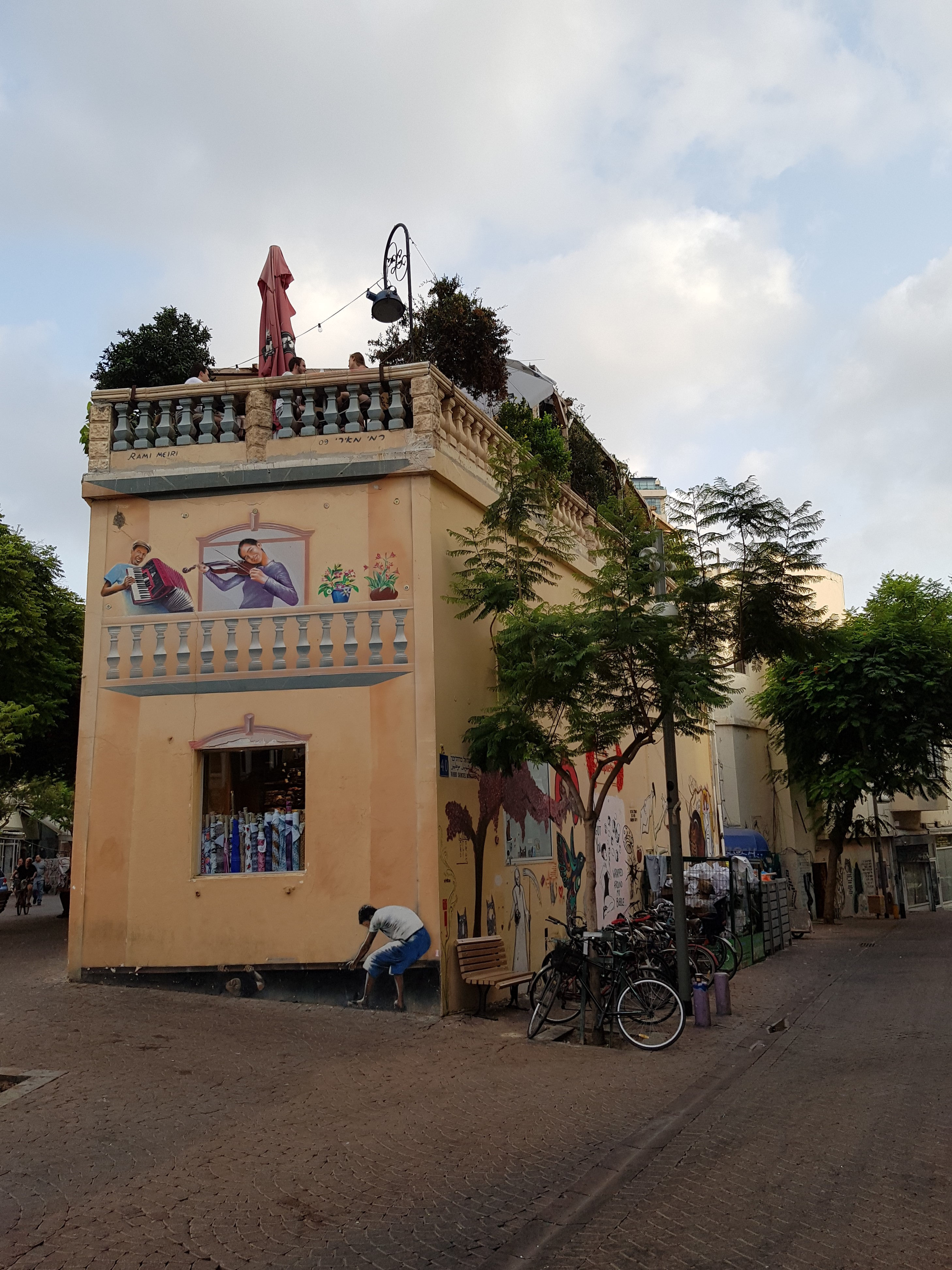 שכונת נחלת בנימין קמה ב-5 בדצמבר 1909 במקביל לאחוזת בית. השכונה כללה רחוב אחד, המקביל לרחוב הרצל.